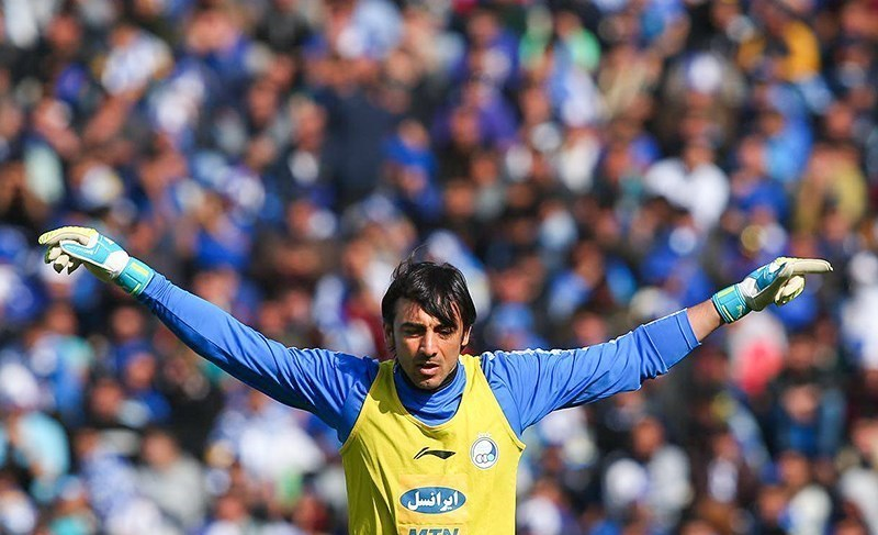 تصاویر تسنیم از شهرآورد هشتاد و ششم تهران